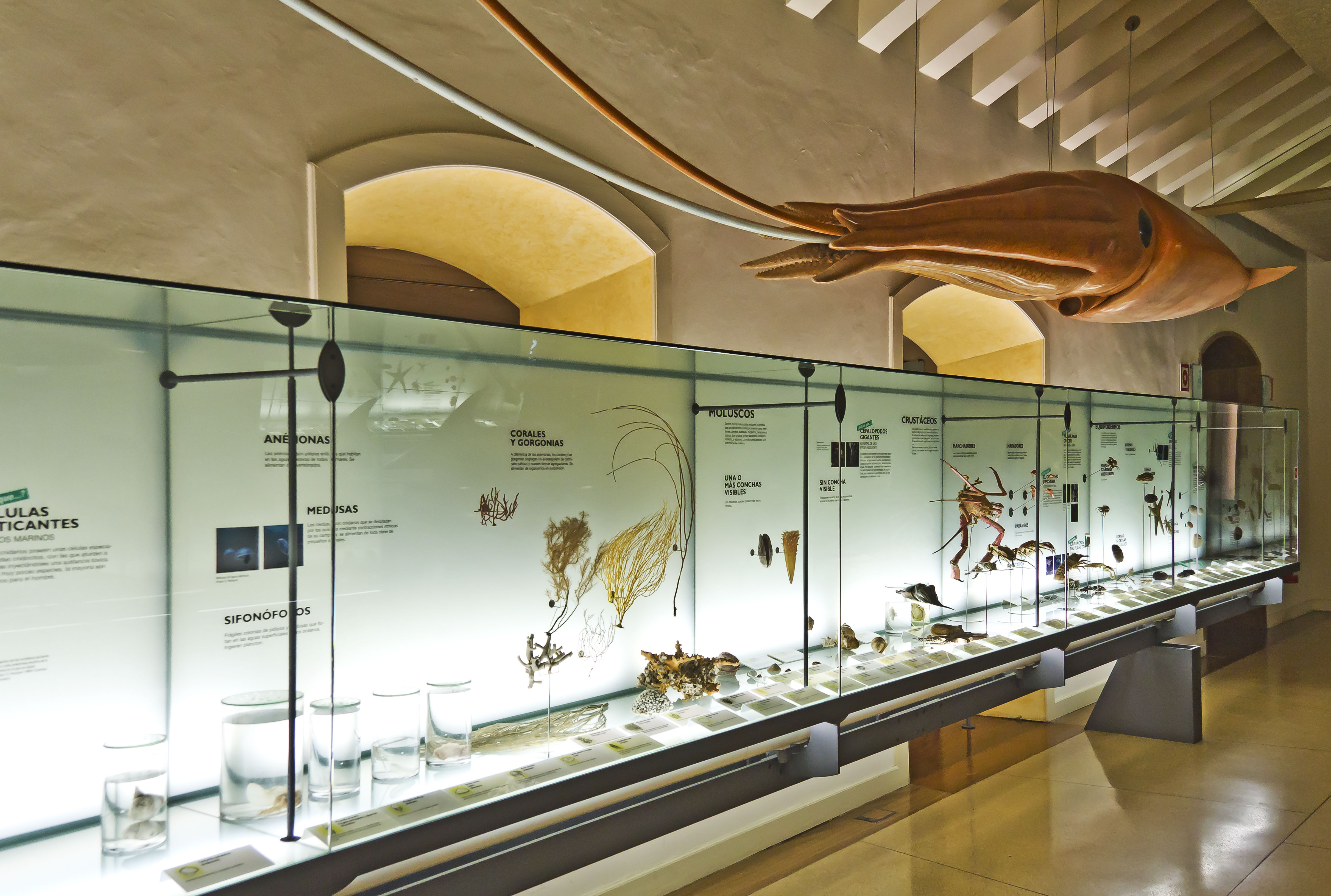 Museo de la Naturaleza y el Hombre Santa Cruz de Tenerife / Exposición Planta Segunda Ciencias naturales Área 3 / Biología marina